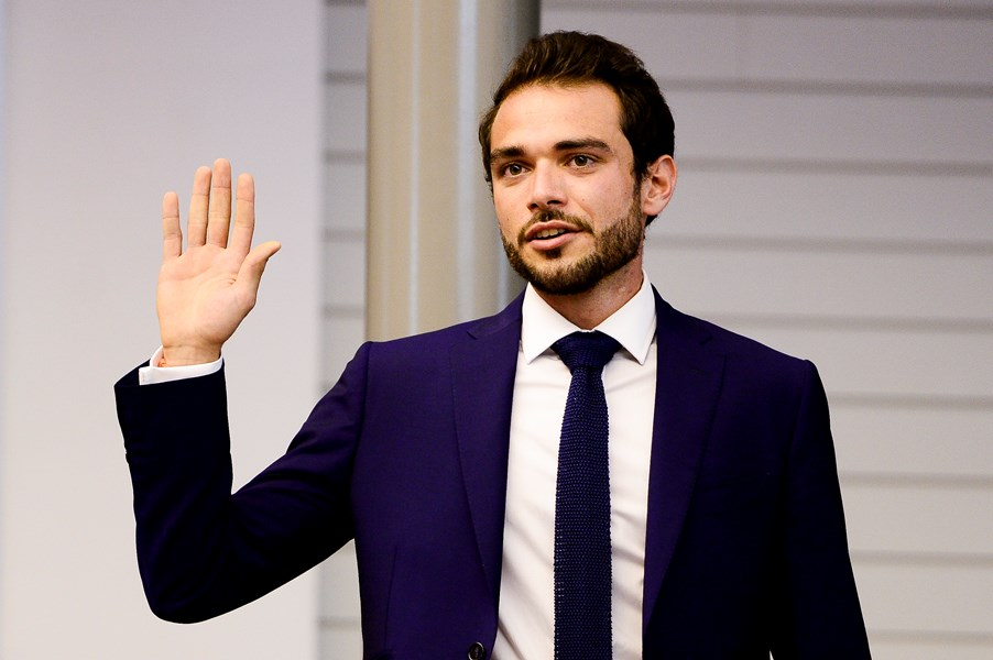 Prestation de serment de Julien Uyttendaele